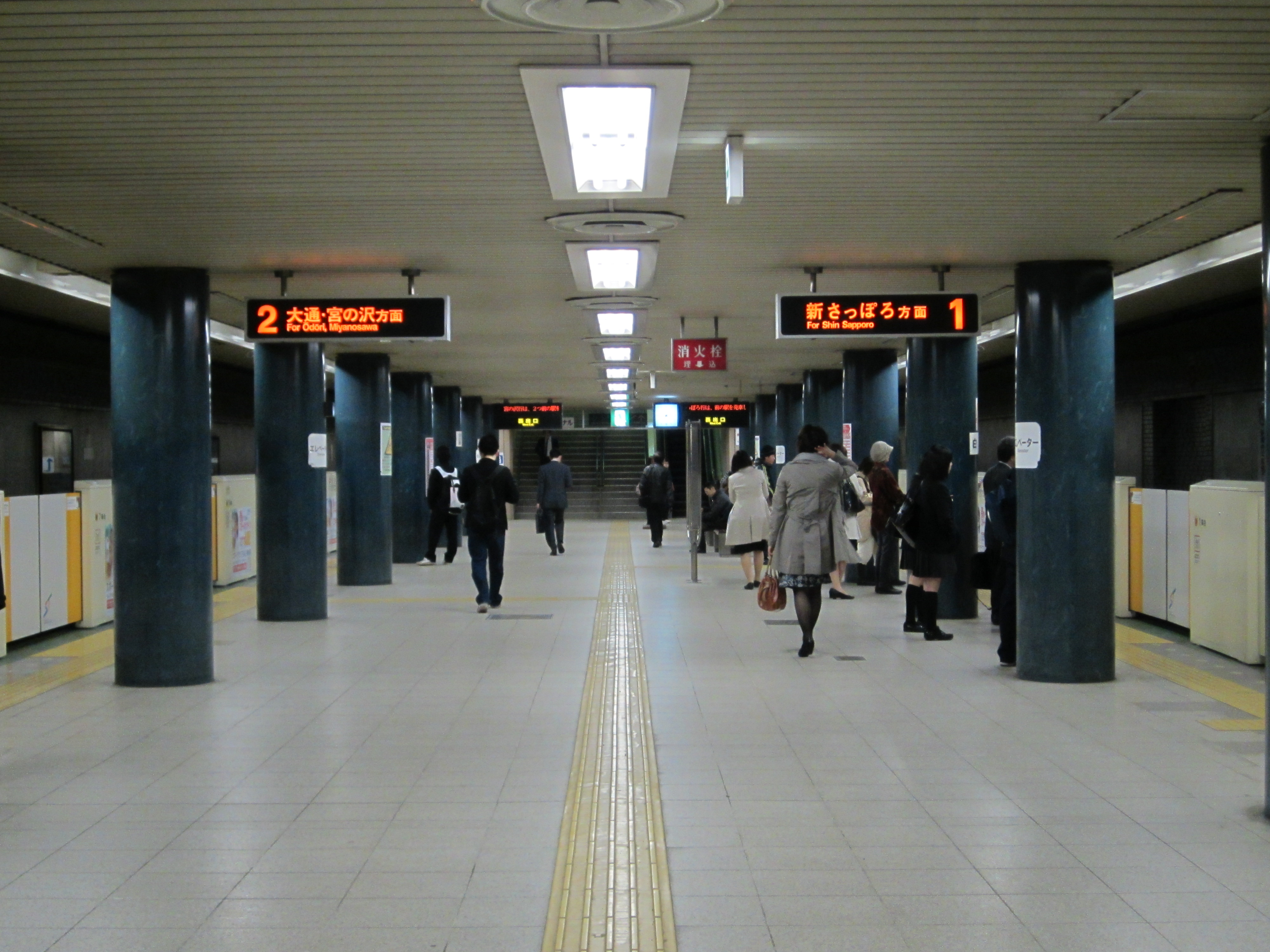 札幌市営地下鉄白石駅ホーム